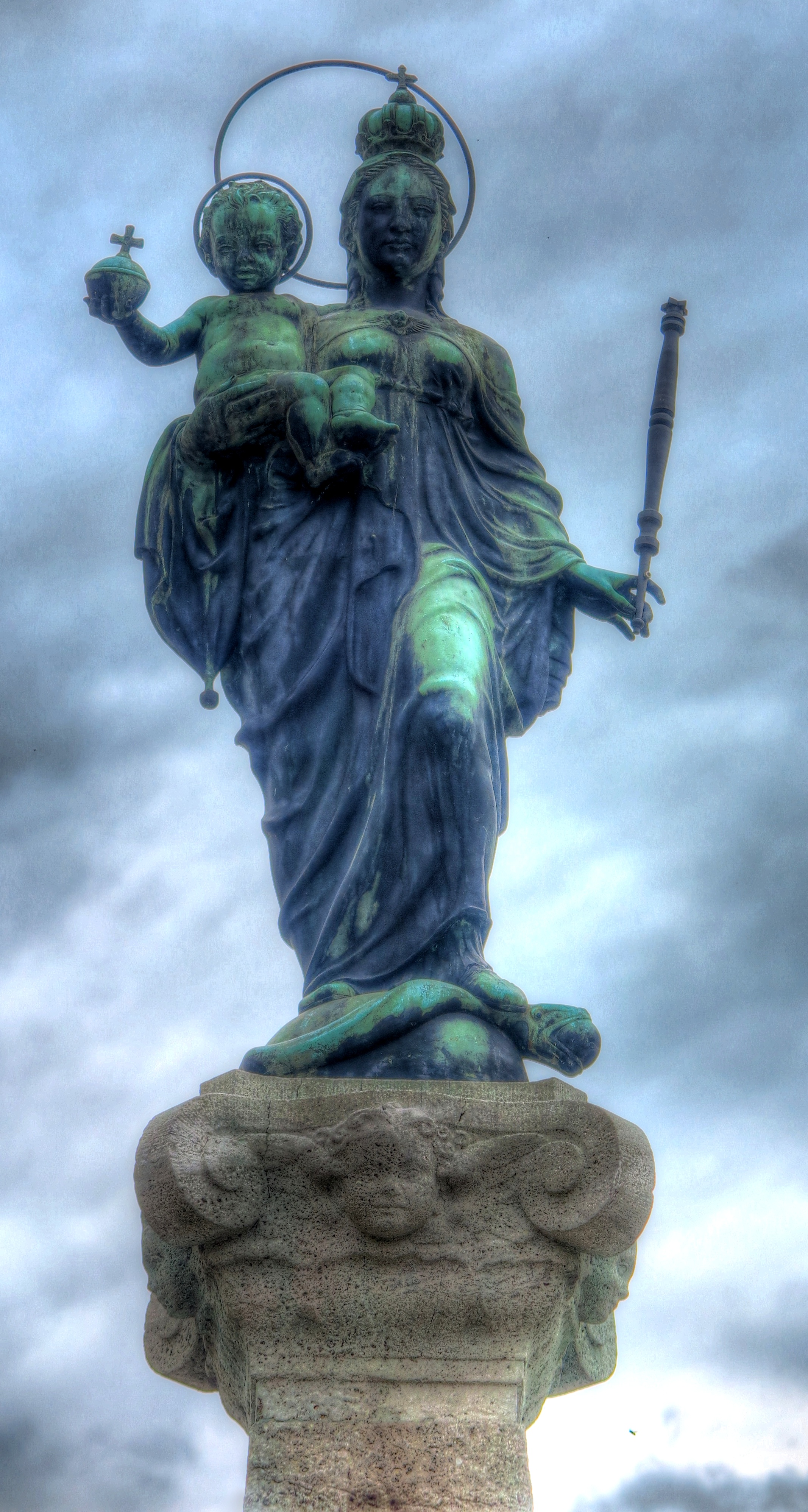 Deutschland, Bayern, Oberbayern, Landkreis Dillingen, Wertingen, Marienfigur des Marienbrunnens am Wertinger Marktplatz